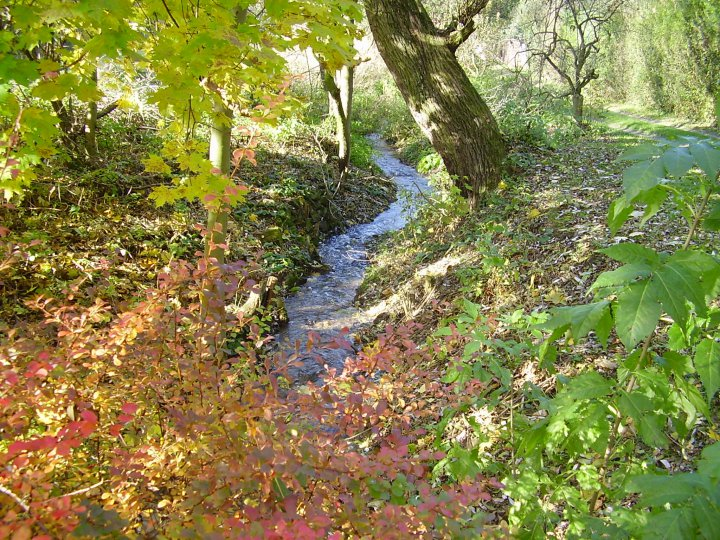 Turský potok - podzim